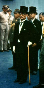 Mamoru Shigemitsu / 重光葵